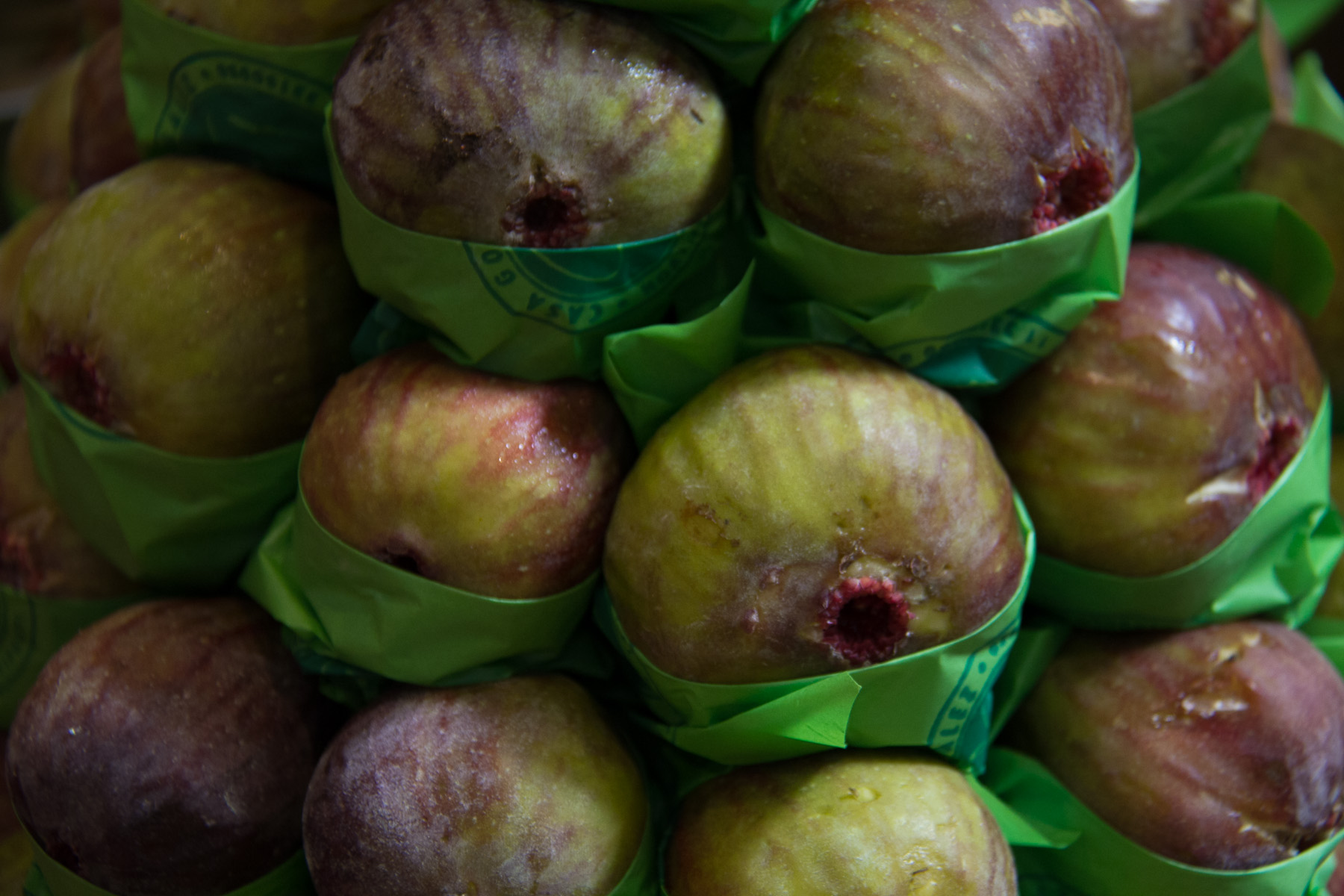 Um dos maiores icones da cidade de Sao Paulo,frutas,legumes,pescados,carnes do mundo todo estao la.